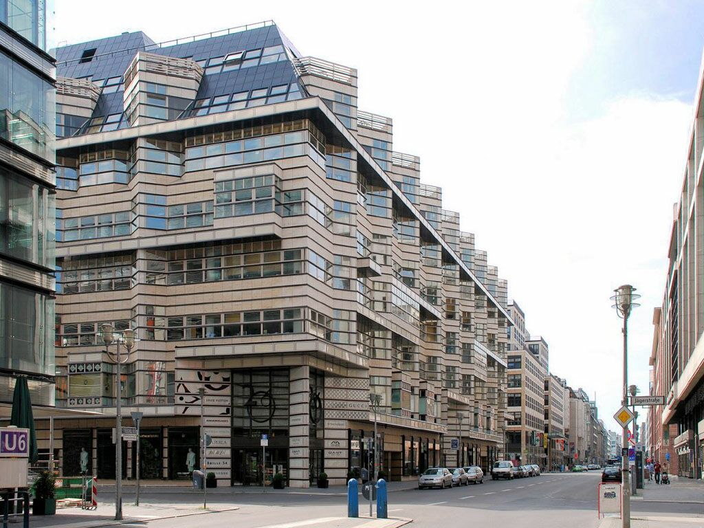 Blick in die Friedrichstraße auf das Quartier 206 in Berlin-Mitte.